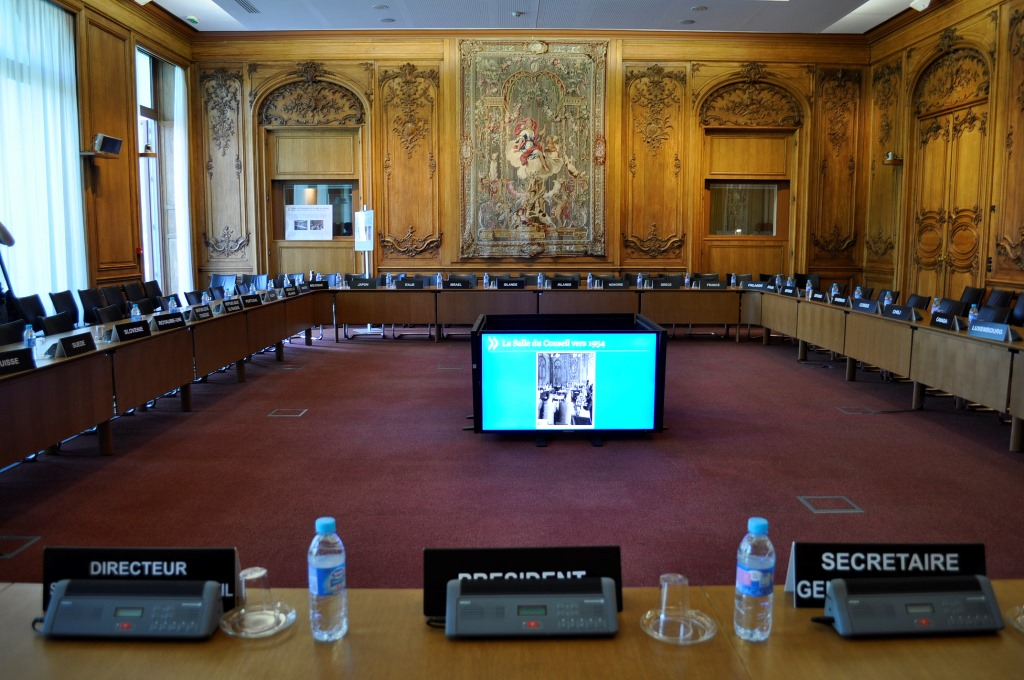 Château de la muette à Paris dans le 16ème arrondissement, siège de l'OCDE Grand Salon - salle C où siège le conseil d'administration de l'OCDE Boiseries de style Régence, Louis XV en chêne et sculptées dans la masse. Trois tapisseries d'une série de huit, Portières des Dieux, datant du XVIIIème siécle. Photo prise lors de journées européennes du patrimoine 2014.